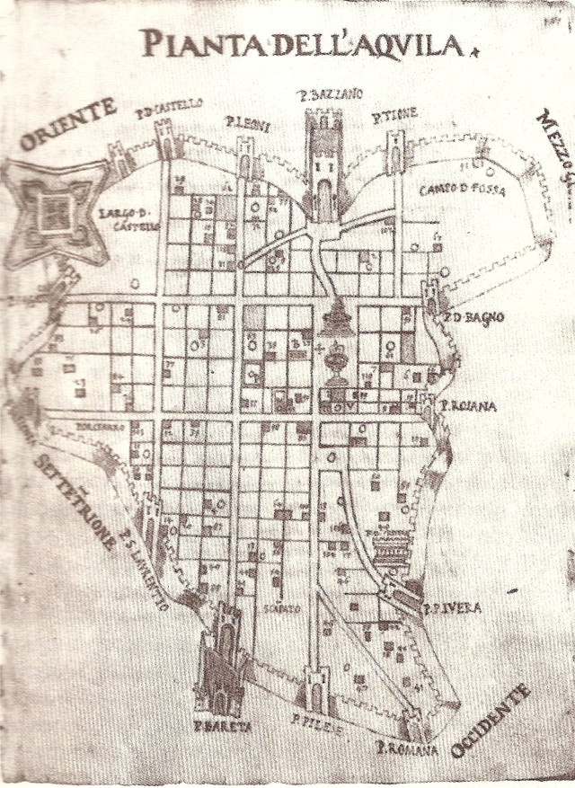 Pianta dell'Aquila realizzata nel 1575 da Girolamo Pico Fonticulano con evidenziata la cinta muraria, le porte urbiche e la suddivisione in locali della parte di città "intra moenia". La pianta è parte della "Descrizione delle sette città illustri d'Italia"; una edizione conservata nella biblioteca provinciale Salvatore Tommasi (L'Aquila) riporta anche le indicazioni delle distanze e l'elenco delle chiese presenti allora nella città. Le porte disegnate, partendo dal Forte spagnolo in alto a sinistra e muovendoci in senso orario, sono: porta senza nome (verosimilmente Porta Barisciano, chiusa al momento della redazione della pianta) P.d.Castello P.Leoni P.Bazzano (con antiporta) P.Tione P.d.Bagno P.Roiana P.Rivera P.Romana P.Pilese P.Bareta (con antiporta) P.S.Laurentio (Porta San Lorenzo) P.Branconia (parz. cancellato) P.Paganica (parz. cancellato)